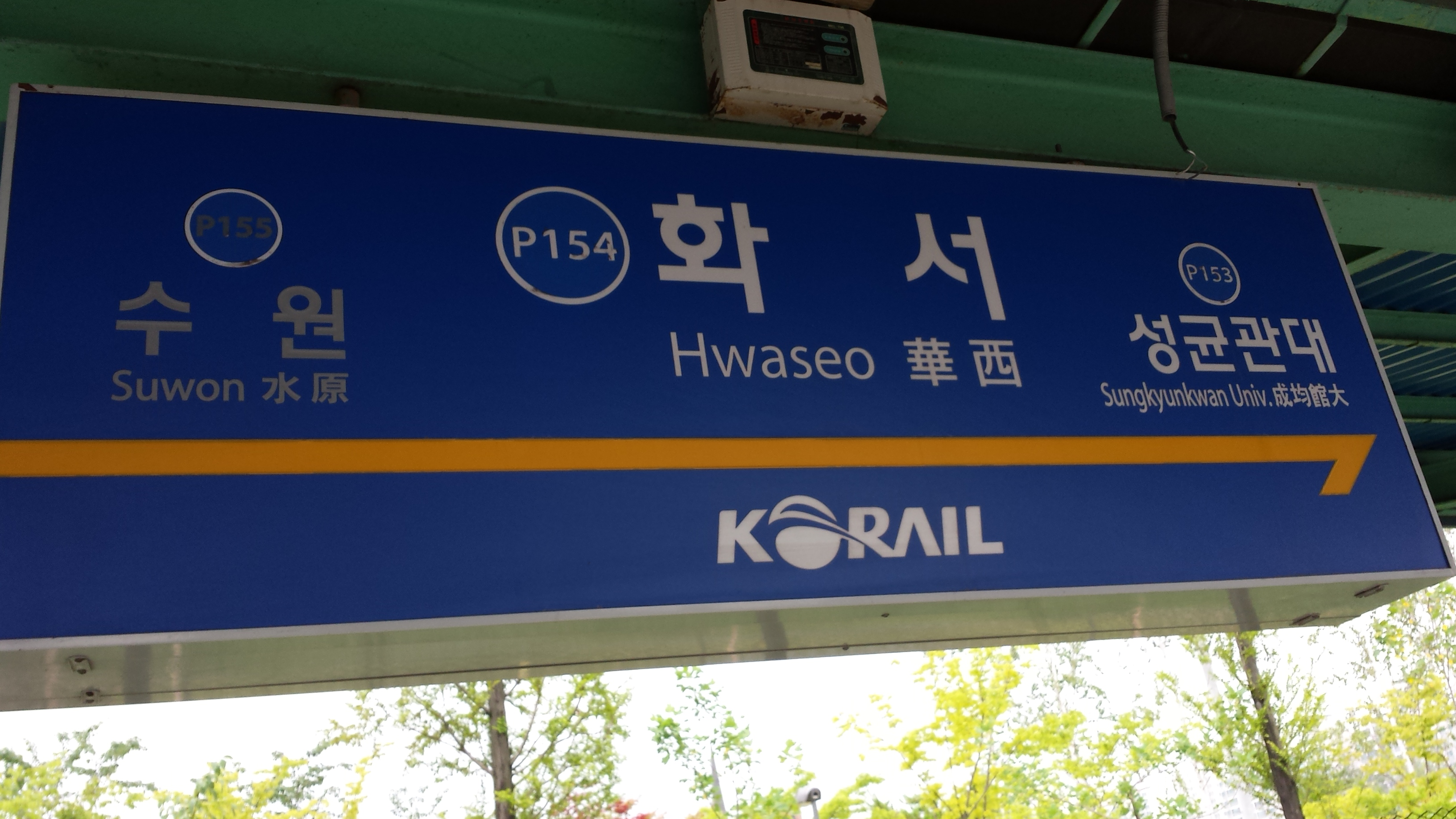 화서역 역명판